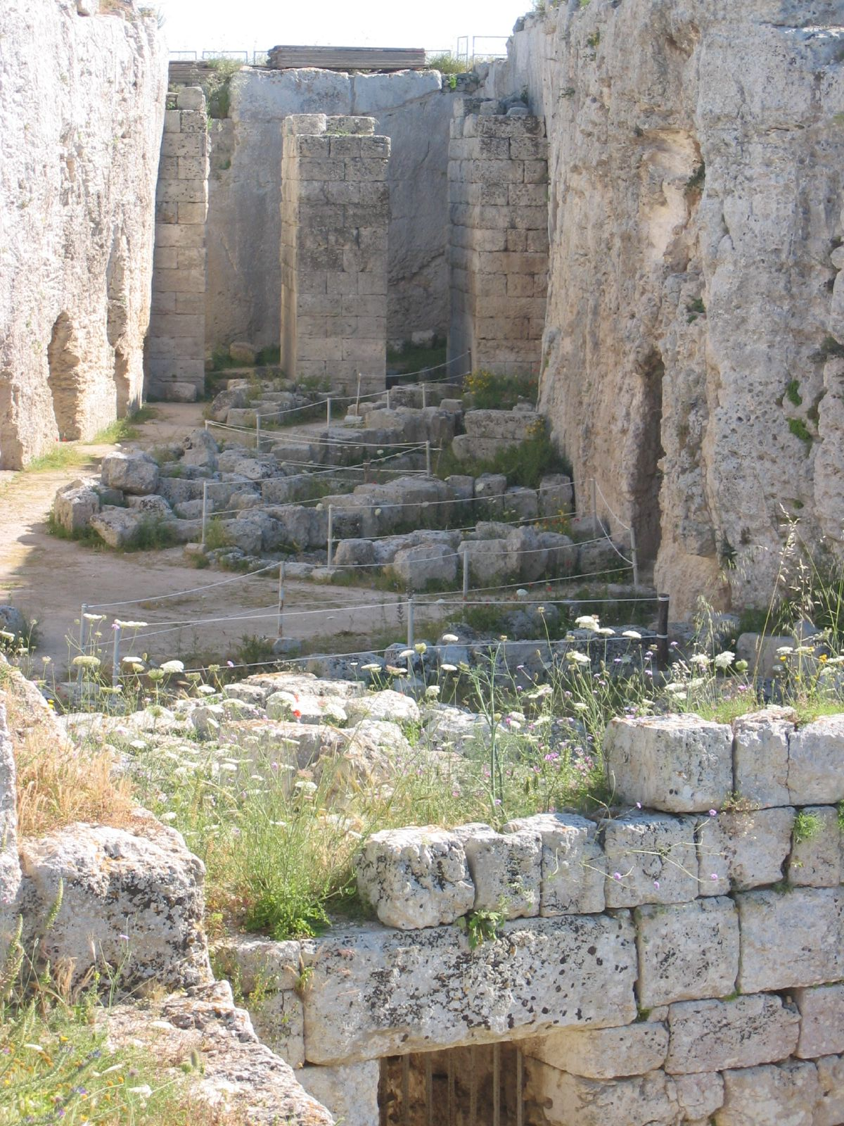 Le rovine del Castello Eurialo a Siracusa (dal greco Evrélos, "a forma di chiodo") costruito da Dionisio il Vecchio nel 397 a.C., e ristrutturato in epoca bizantina. Castello Eurialo around 1900. In 2005.